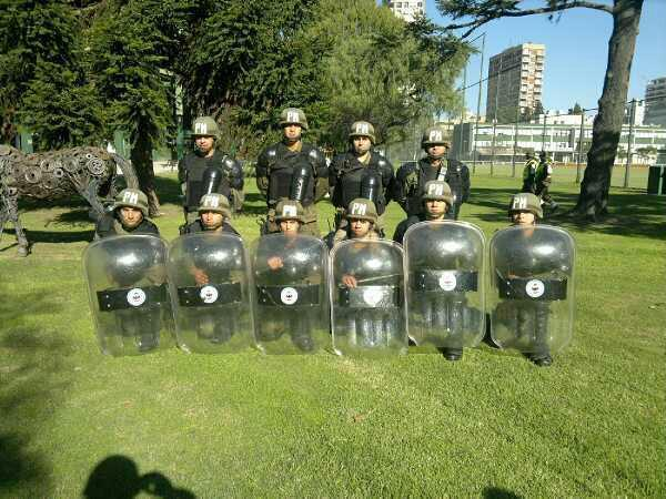 Sección Anti-disturbios de la Ca PM 601